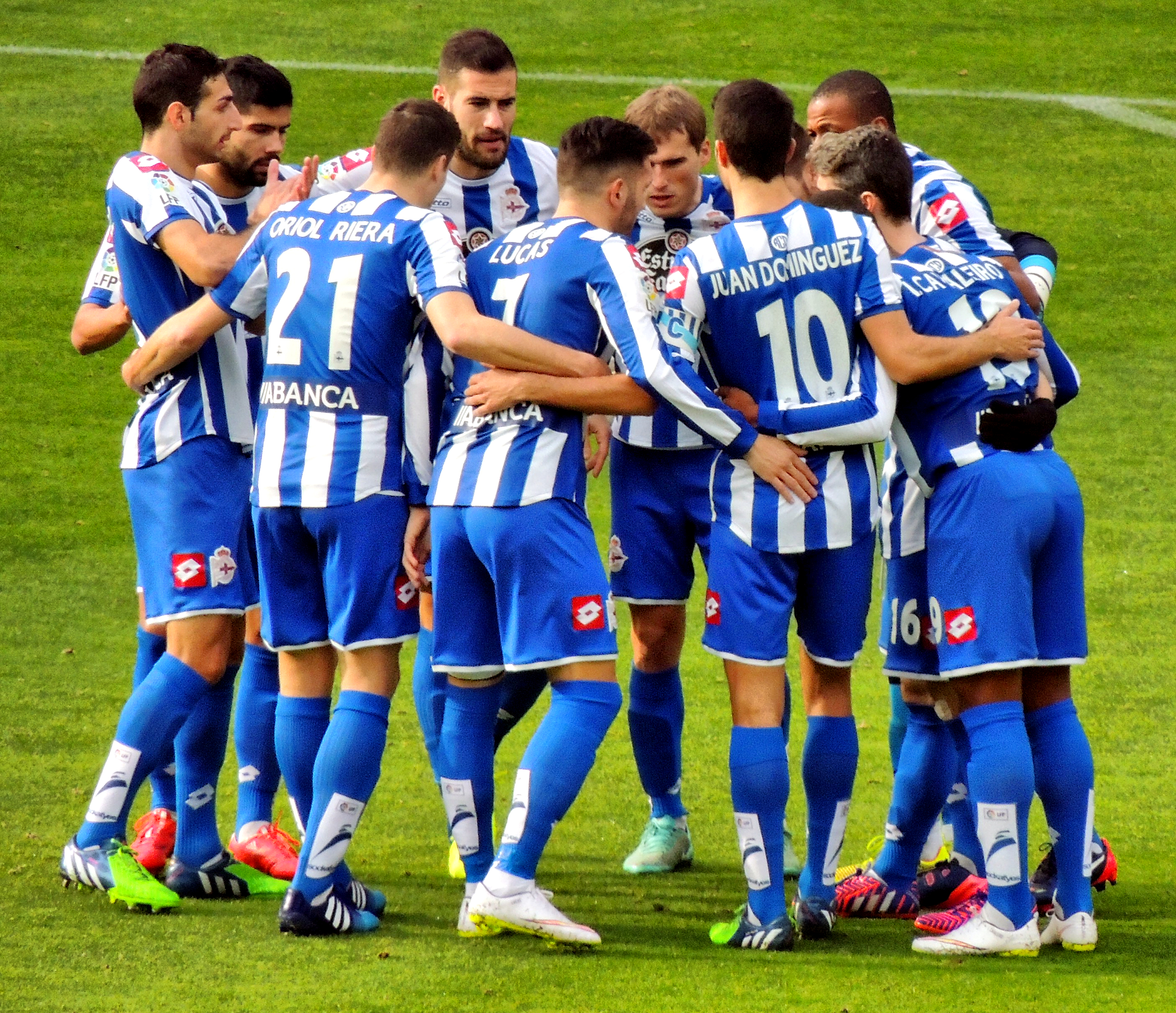 Xogadores do Deportivo da Coruña (2015).